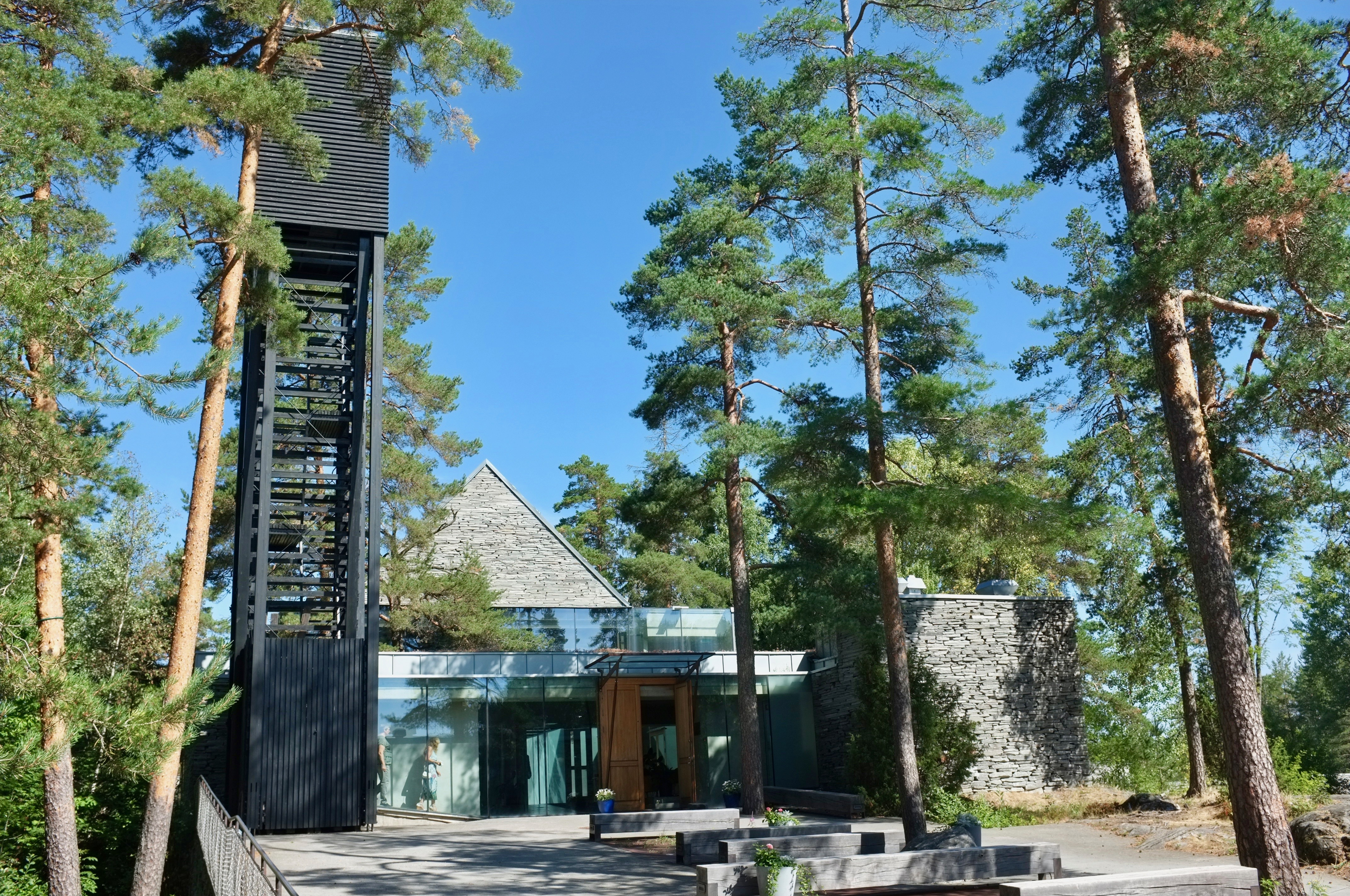 Mortensrud kirke i Oslo.